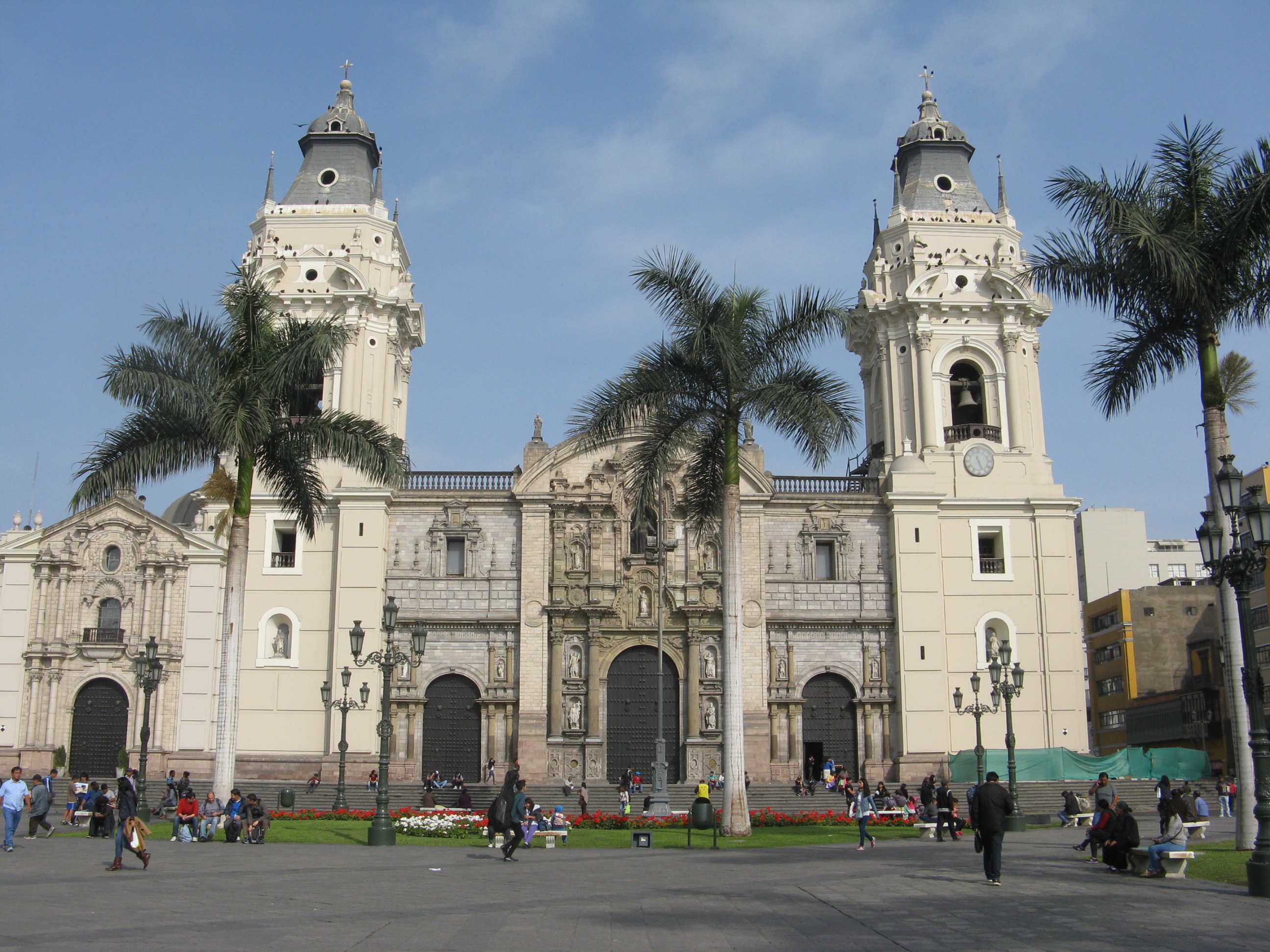 Junto con la puerta del Perdón, las dos torres gemelas conforman la fachada de la catedral frente a la Plaza de Armas.